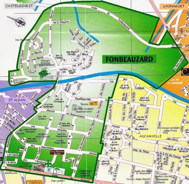 carte